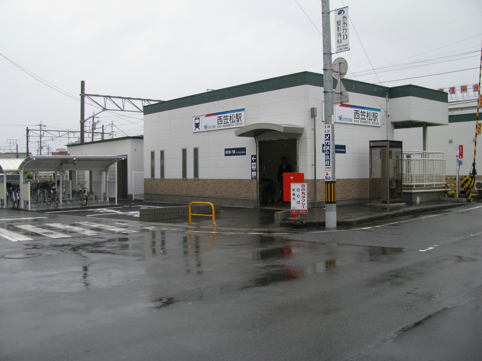 名鉄竹鼻線西笠松駅